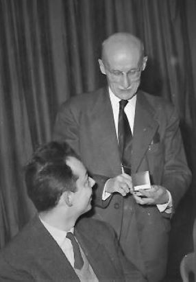 Émile Durin, debout, et François Michelin. 1960. Photo Léon Gendre, Clermont-Ferrand. Collection privée.